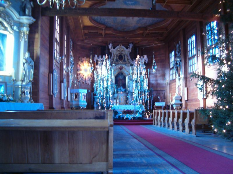 Nawa główna w kościele parafialnym pw. Św. Tekli w Dobrzycy, powiat pleszewski, woj. wielkopolskie